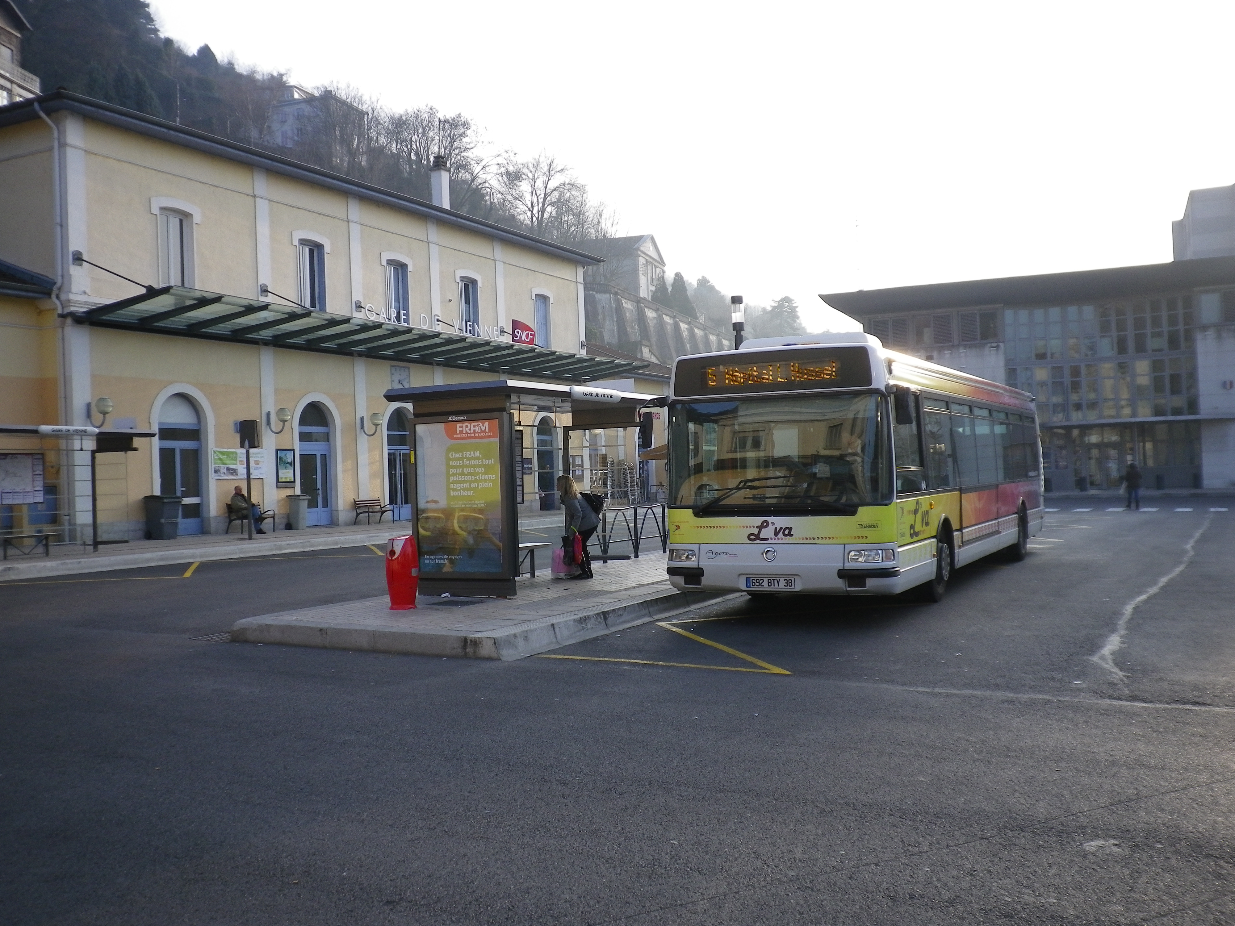 Bus L'VA devant la Gare de Vienne.Pentax Optio H90